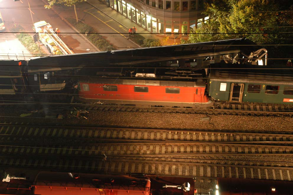 Zugskollision in Zürich Oerlikon Höhe Überführung Binzmühlestrasse von Freitag, 24. Oktober 2003